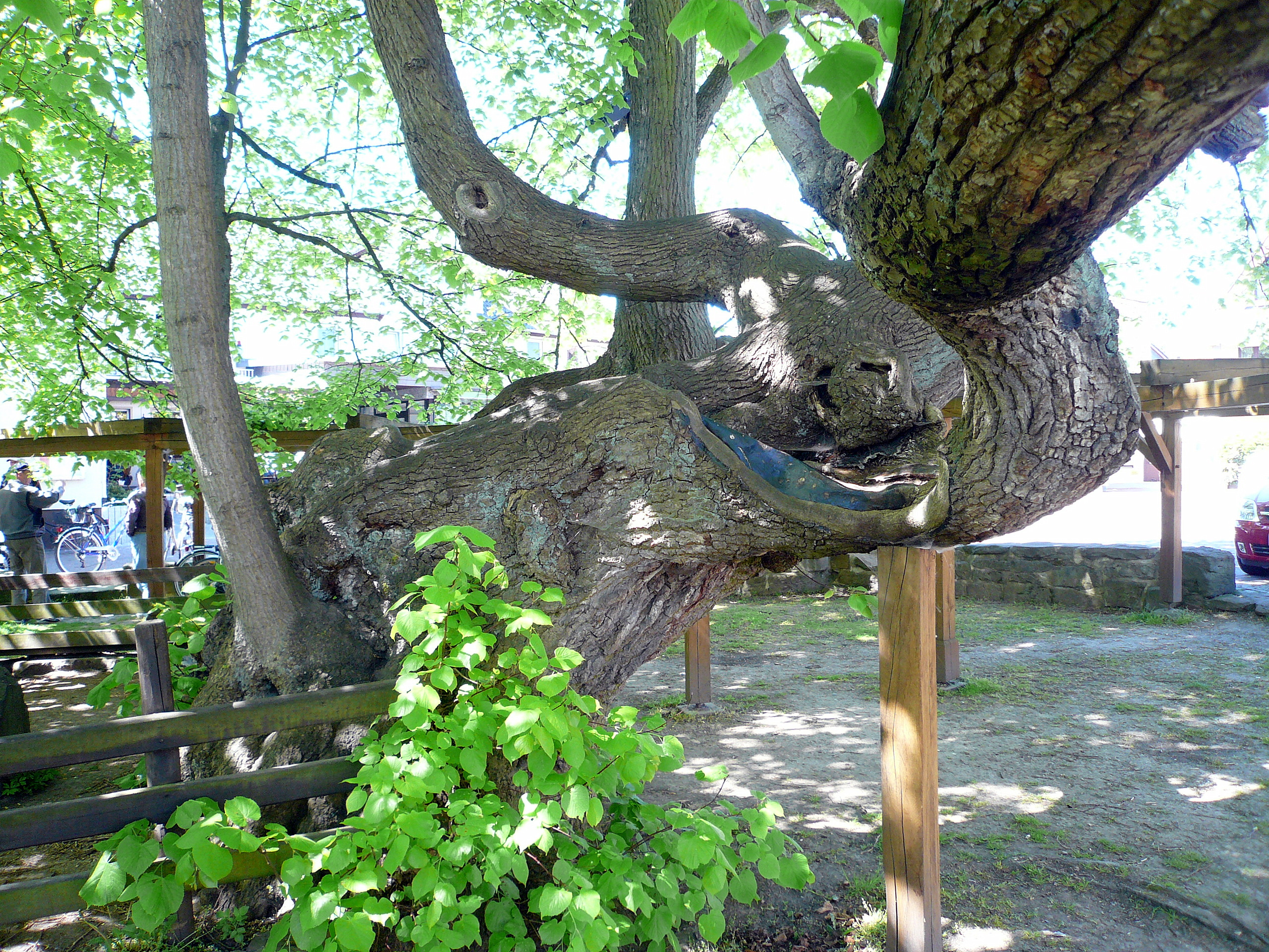 Lime in Schenklengsfeld, Germany